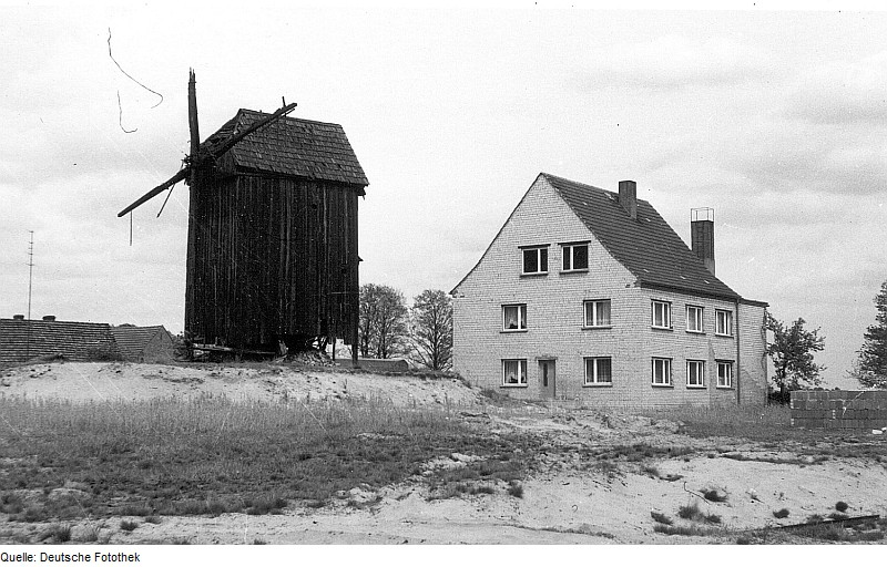 Original image description from the Deutsche Fotothek Unterspreewald-Neuendorf am See. Bockmühle und Umfeld